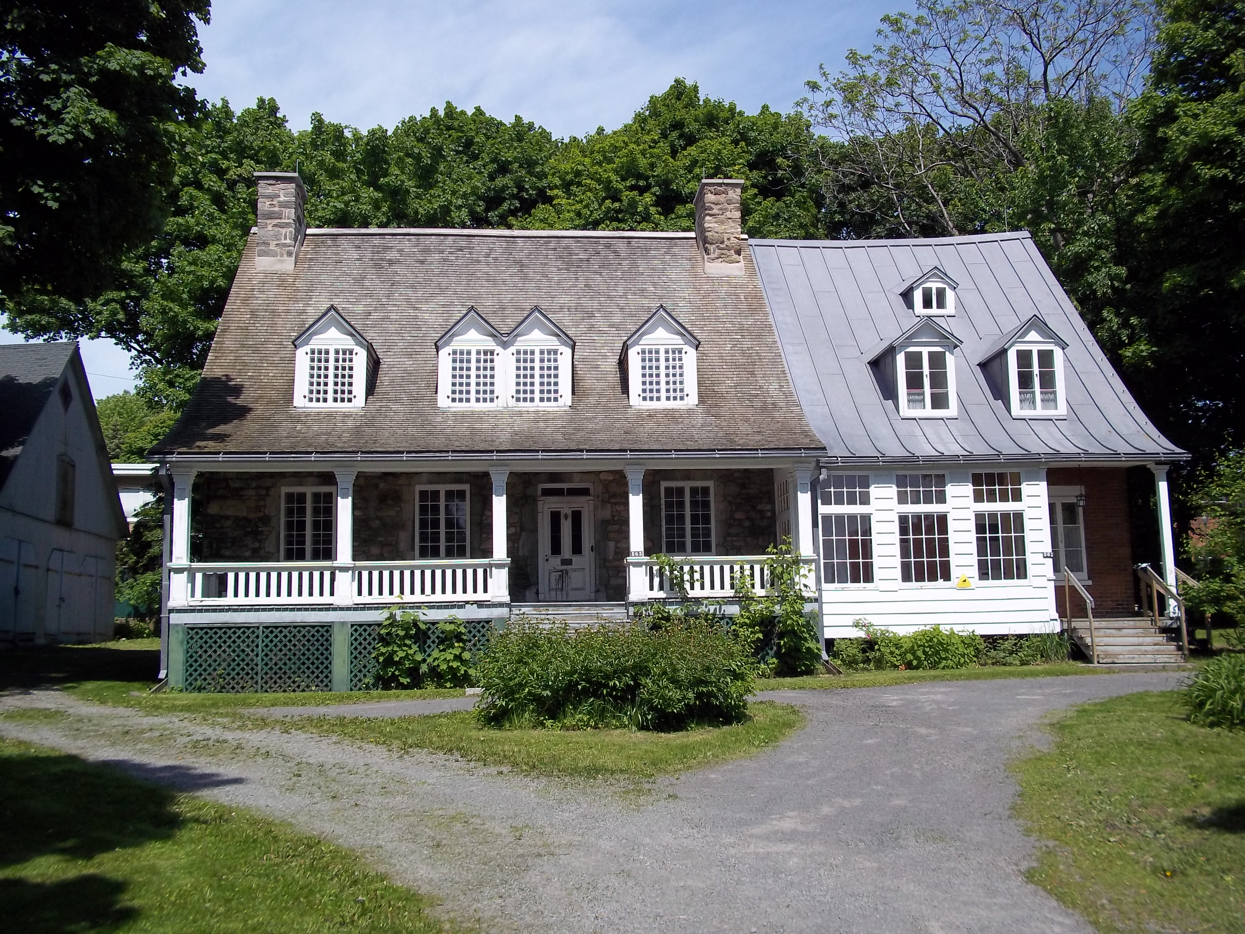 Maison Hurtubise, 561, chemin de la Côte-Saint-Antoine, Westmount